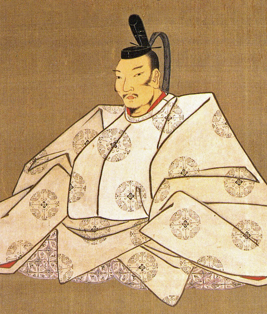 豊臣秀次像（部分）